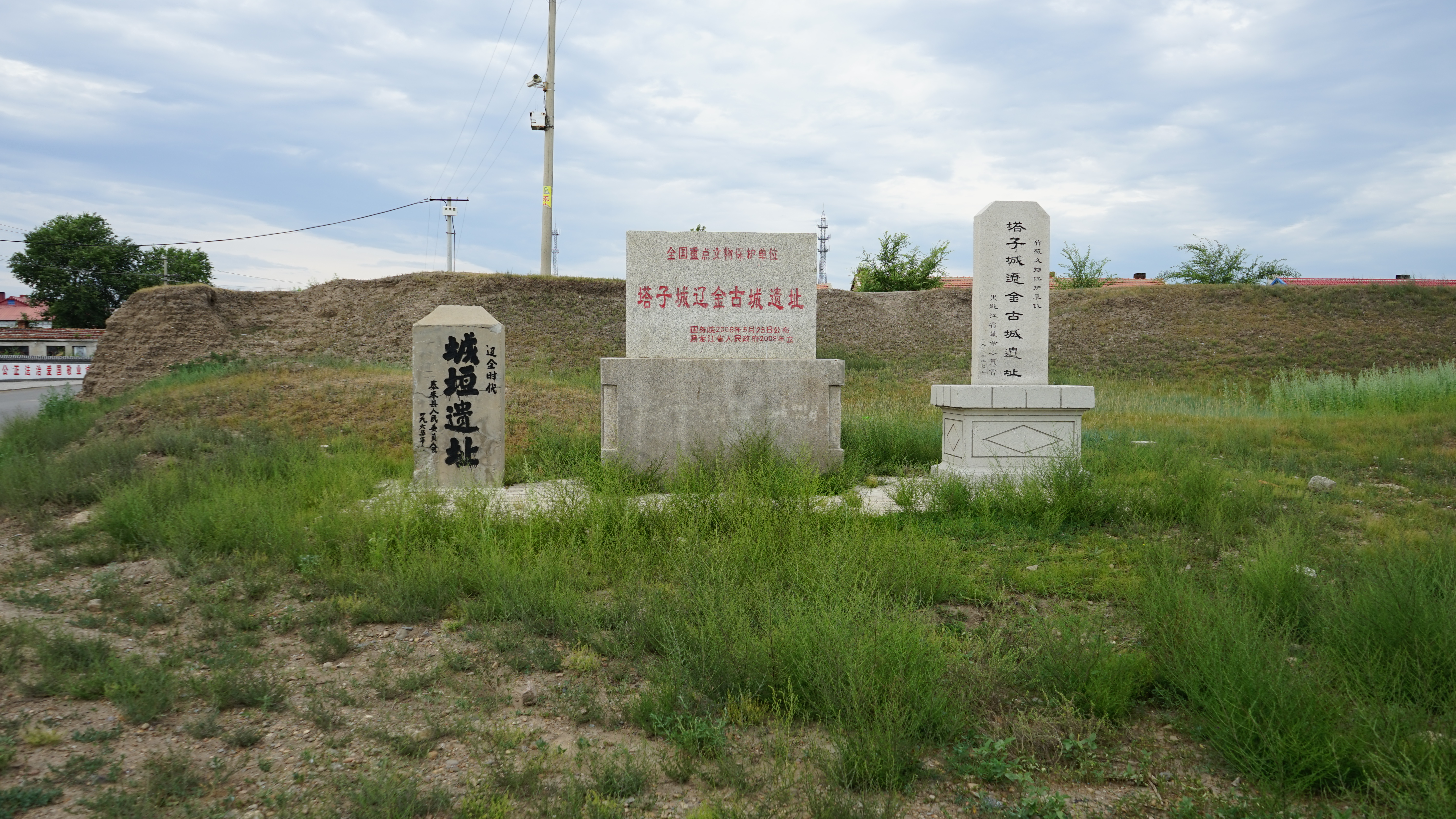 中文（中国大陆）: 塔子城 城墙遗址 (南)